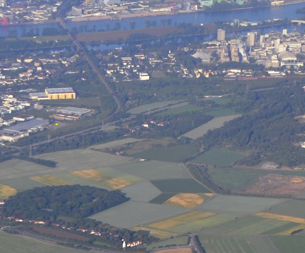 Vue aérienne de l'Hesslerhof à Mainz-Amöneburg.